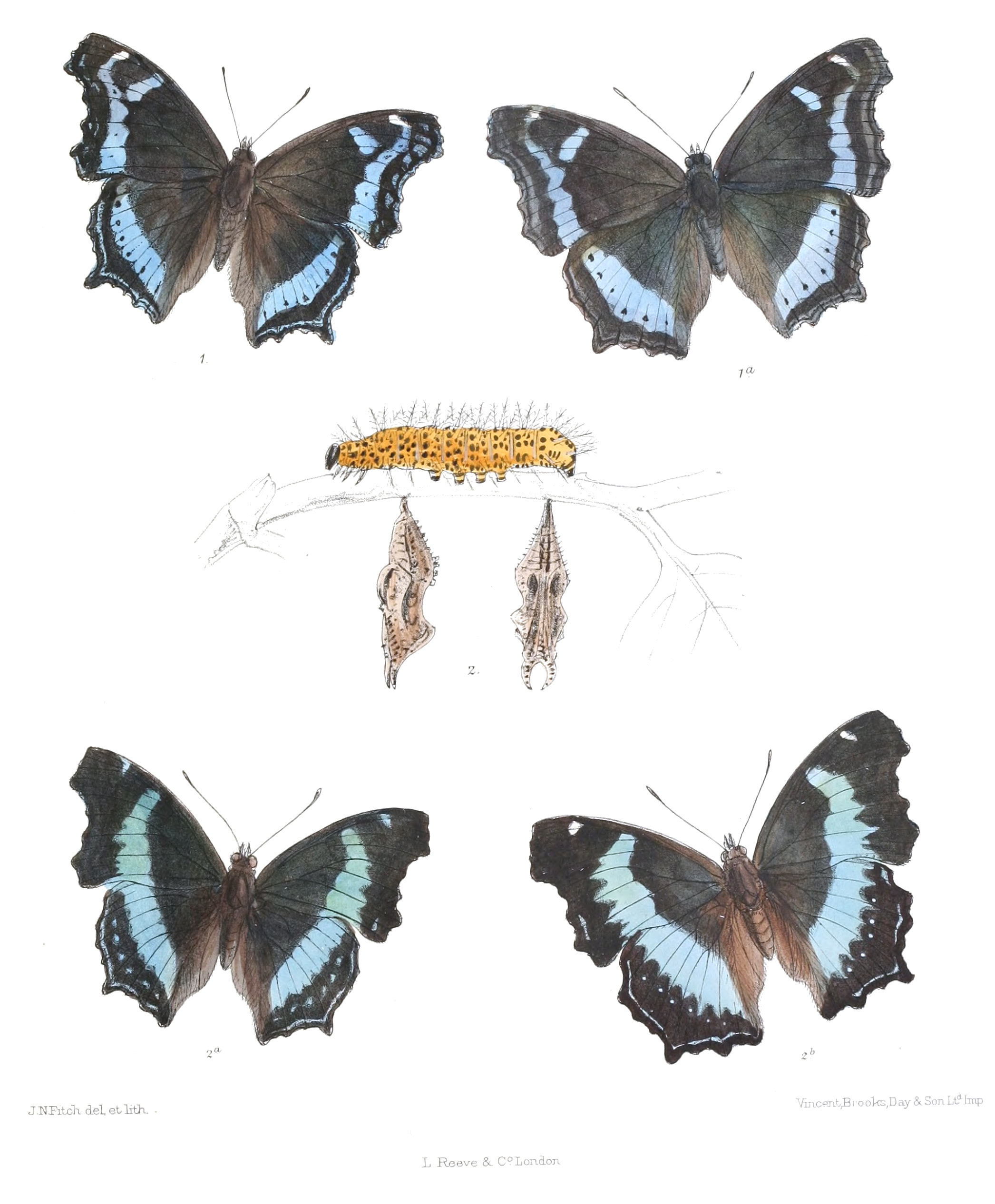 1 1 a Kaniska canacea (=Kaniska canace) (m, f) 2 Kaniska haronica (larva and pula) 2 a b Kaniska haronica (m, f)